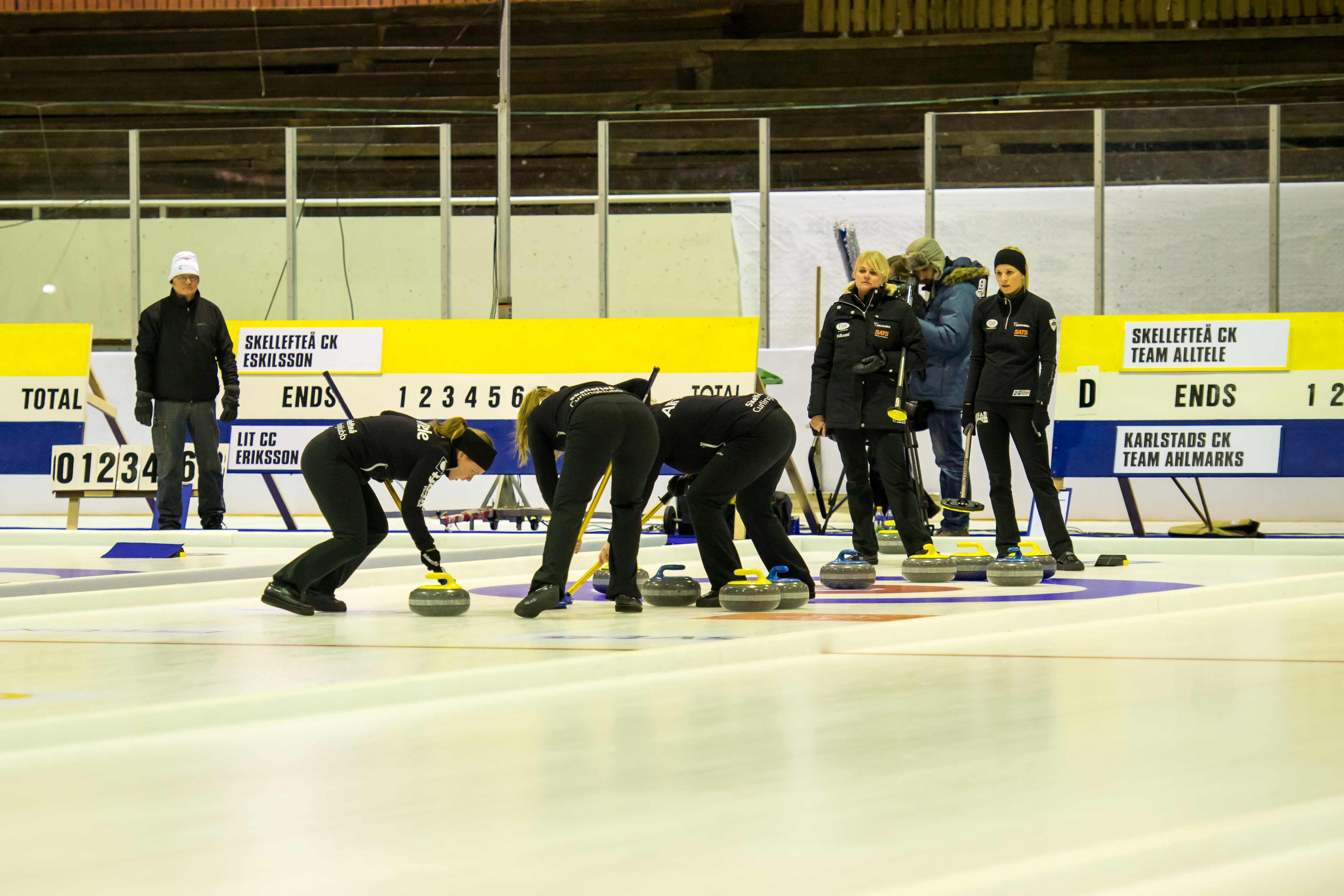 SM-final i curling, damer, 2013: Skellefteå CK Team AllTele mot Karlstads CK Team Ahlmarks. Skellefteå CK Team AllTele vann med 7–5.